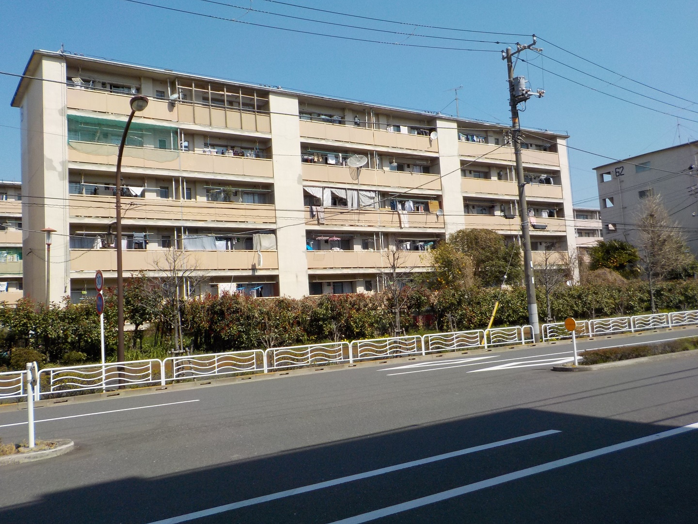 2019年3月、辰巳一丁目アパート内で撮影。5階建ての住棟で、階段室タイプのベランダ側。